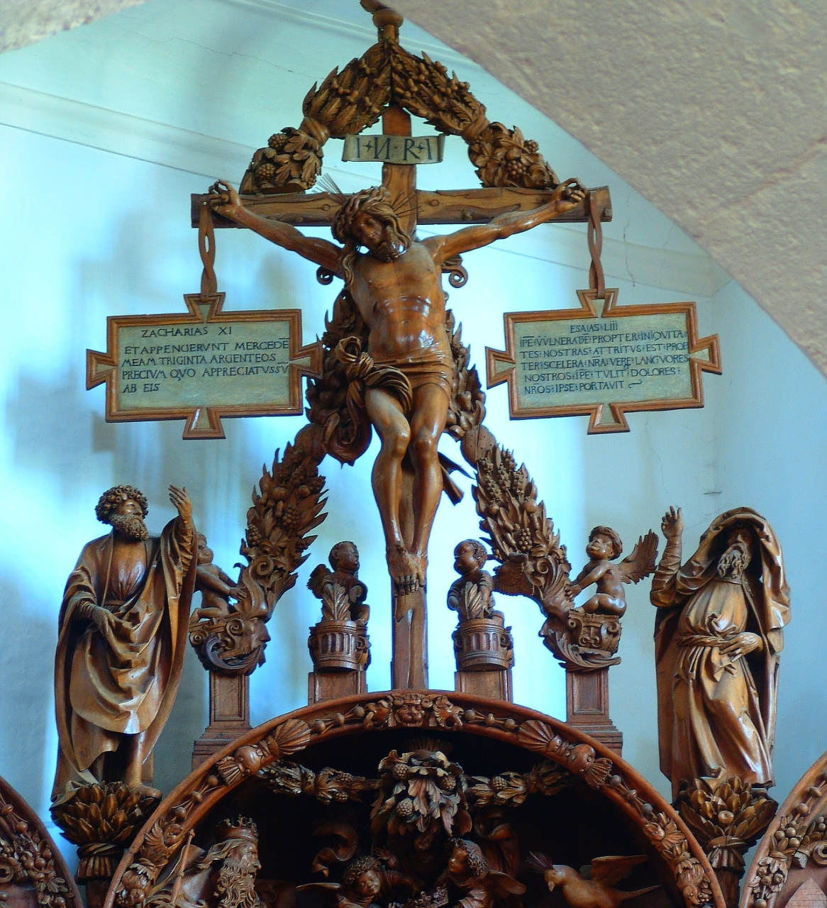 Schnitzaltar, Mauer bei Melk, Kreuzgruppe